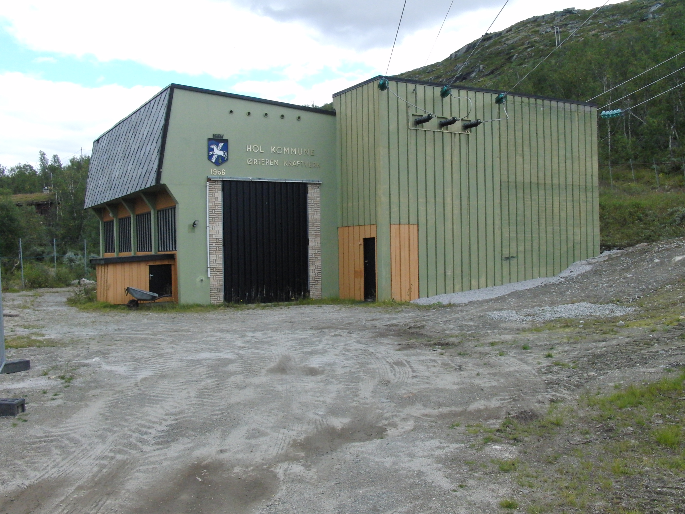 Ørteren kraftverk